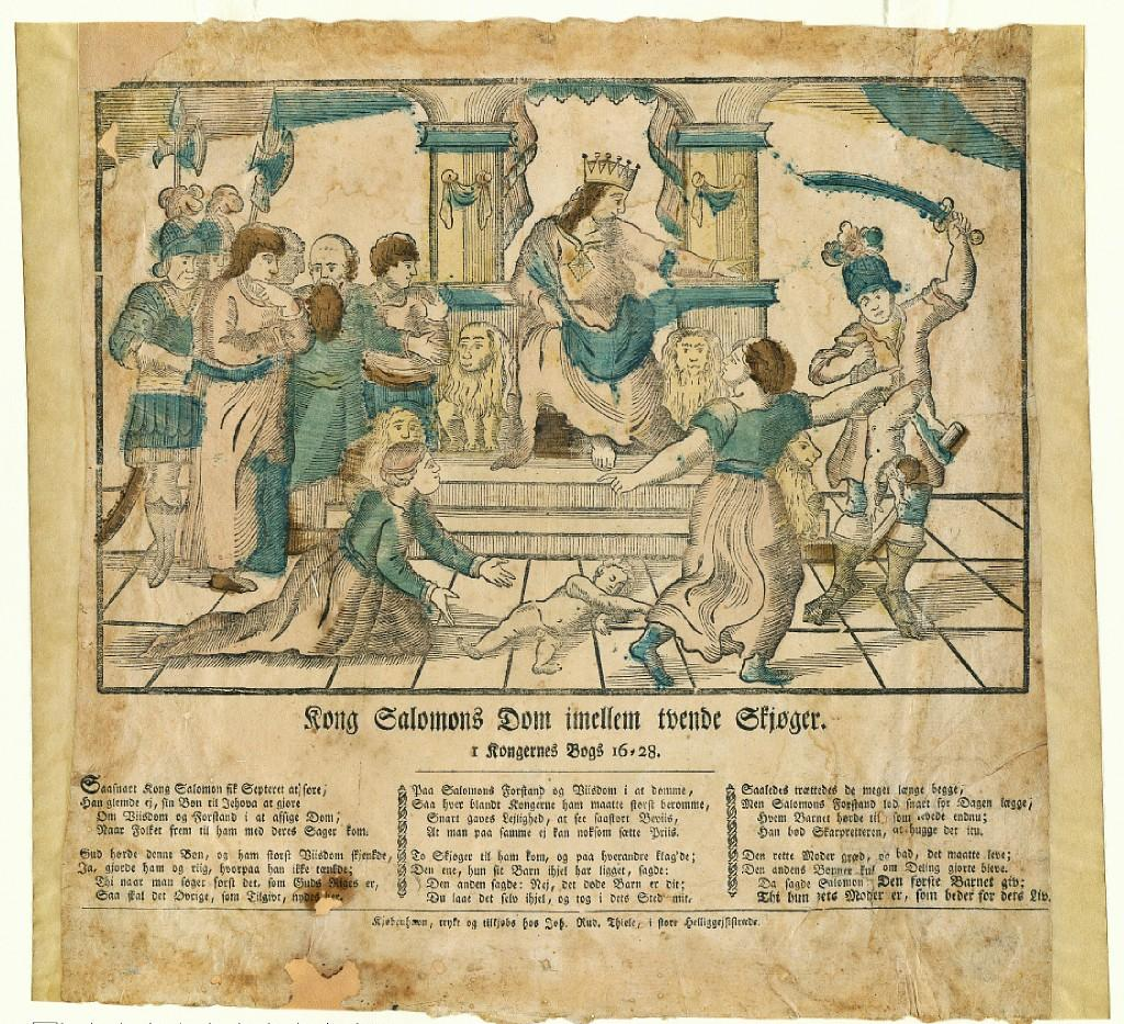 Kong Salomons Dom imellem tvende Skjøger. I Kongernes Bogs 16,28. Johan Rudolph Thiele